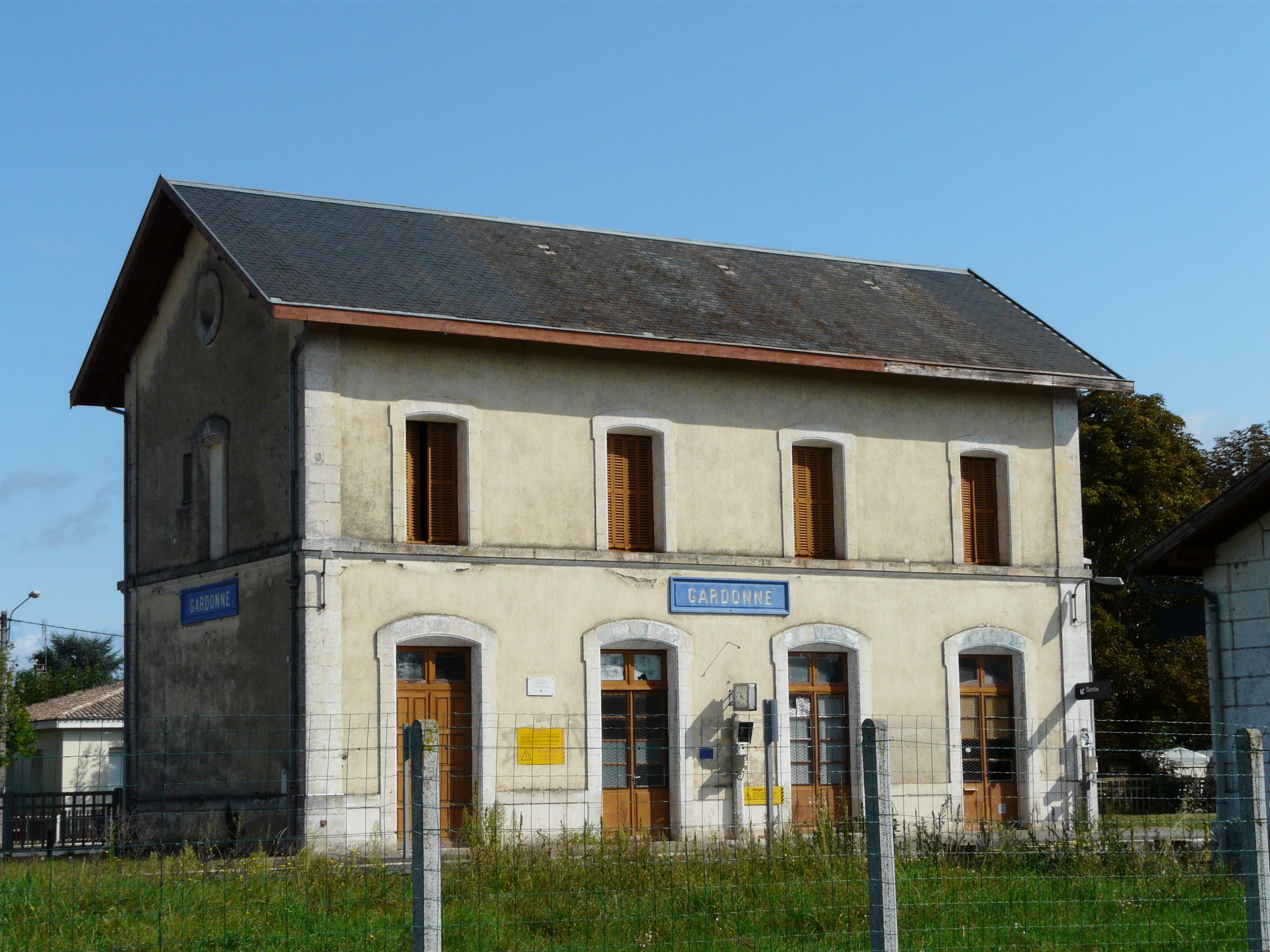 La gare de Gardonne, Dordogne, France.